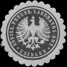 Siegelmarke des Königlich Preußischen Landratsamt des Landkreises Usingen